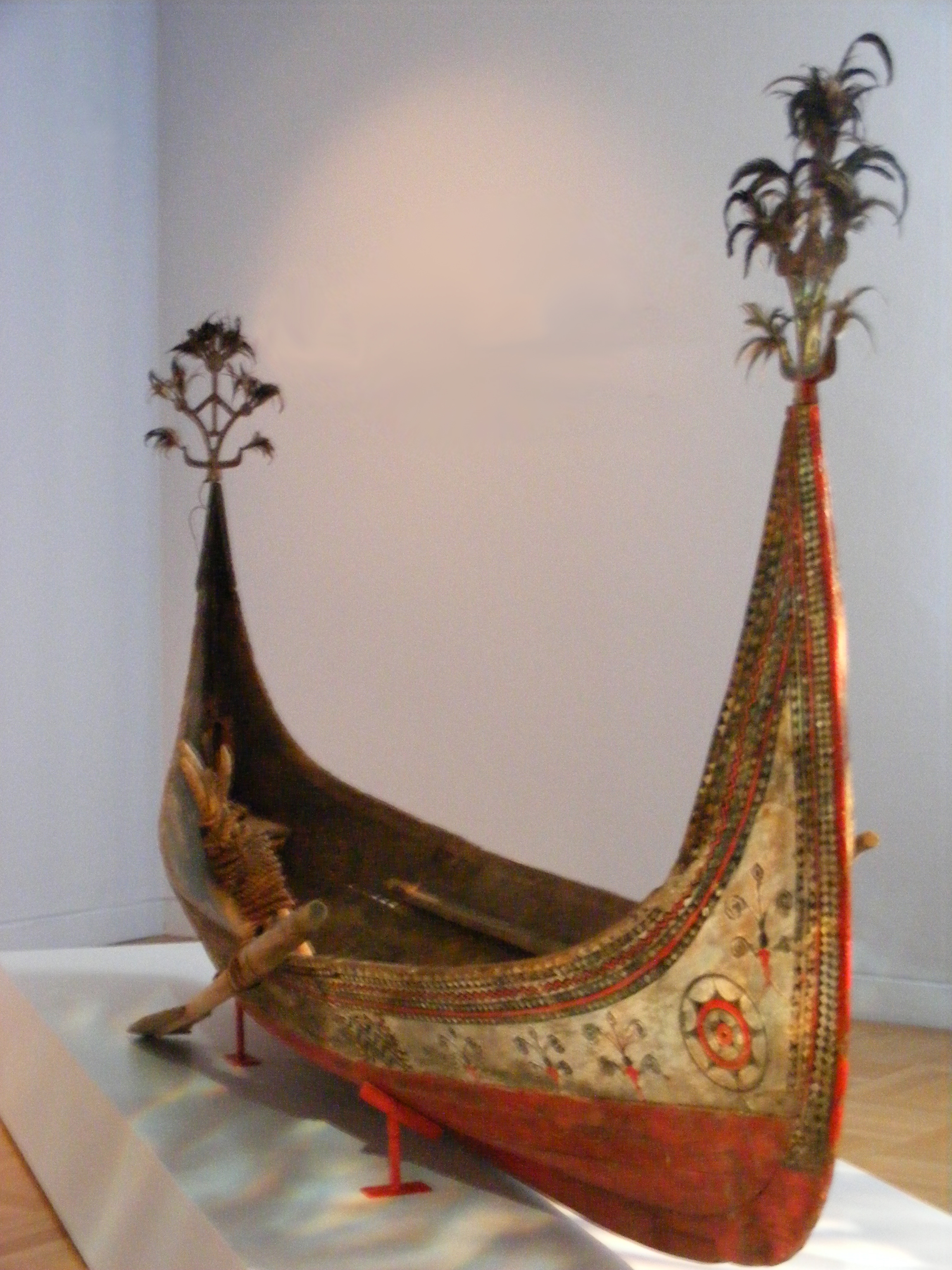 Boot der Yami (Chinurikuran) auf Botel Tobago, Orchid Islands - Exponat der Dauerausstellung “Ozeanien – Weltbilder der Südsee” des Staatlichen Museums für Völkerkunde München (o.J.)